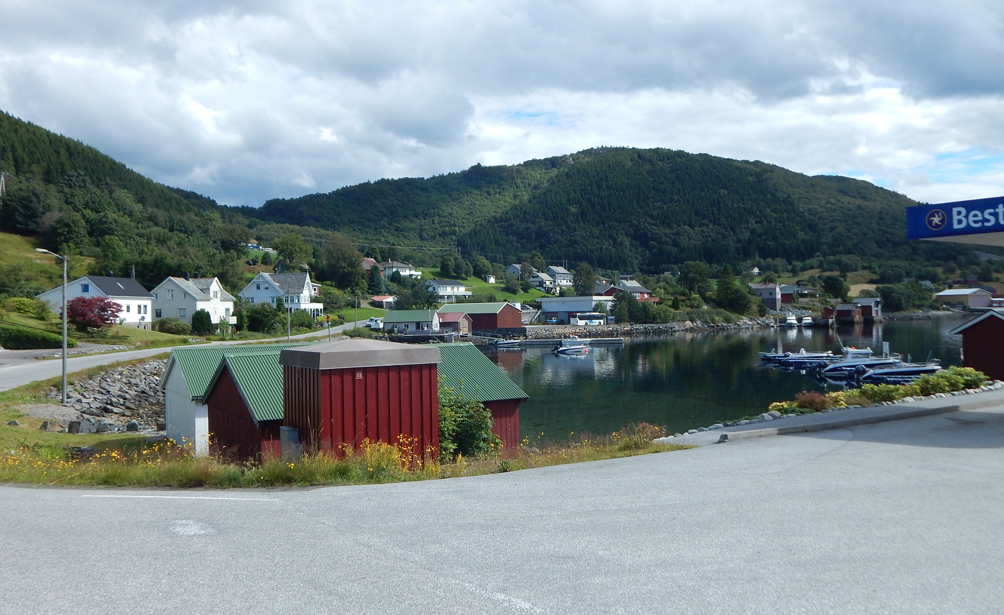 Sørbøvåg